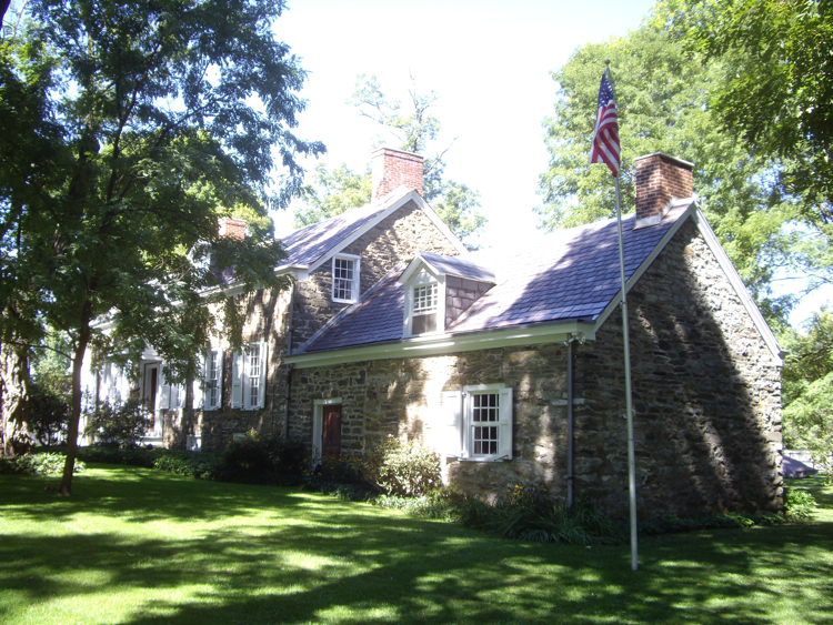 Dubois Kierstede House